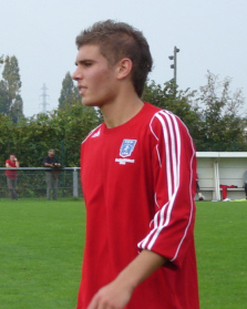 Maxime Le Marchand